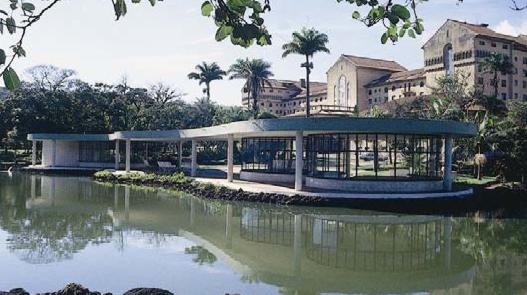 Fonte Andrade Júnior em Araxá/MG onde estão localizadas as Fontes Alcalino-Sulfurosas. O prédio é contituído por um pavilhão situado em uma pequena península no lago de água de Lama Sulfurosa. Possui quatro bebedouros que escoam águas mineralizadas, carbonatada, sulfatada, radioativa e alcalina. Autor: Samuel Peixoto.